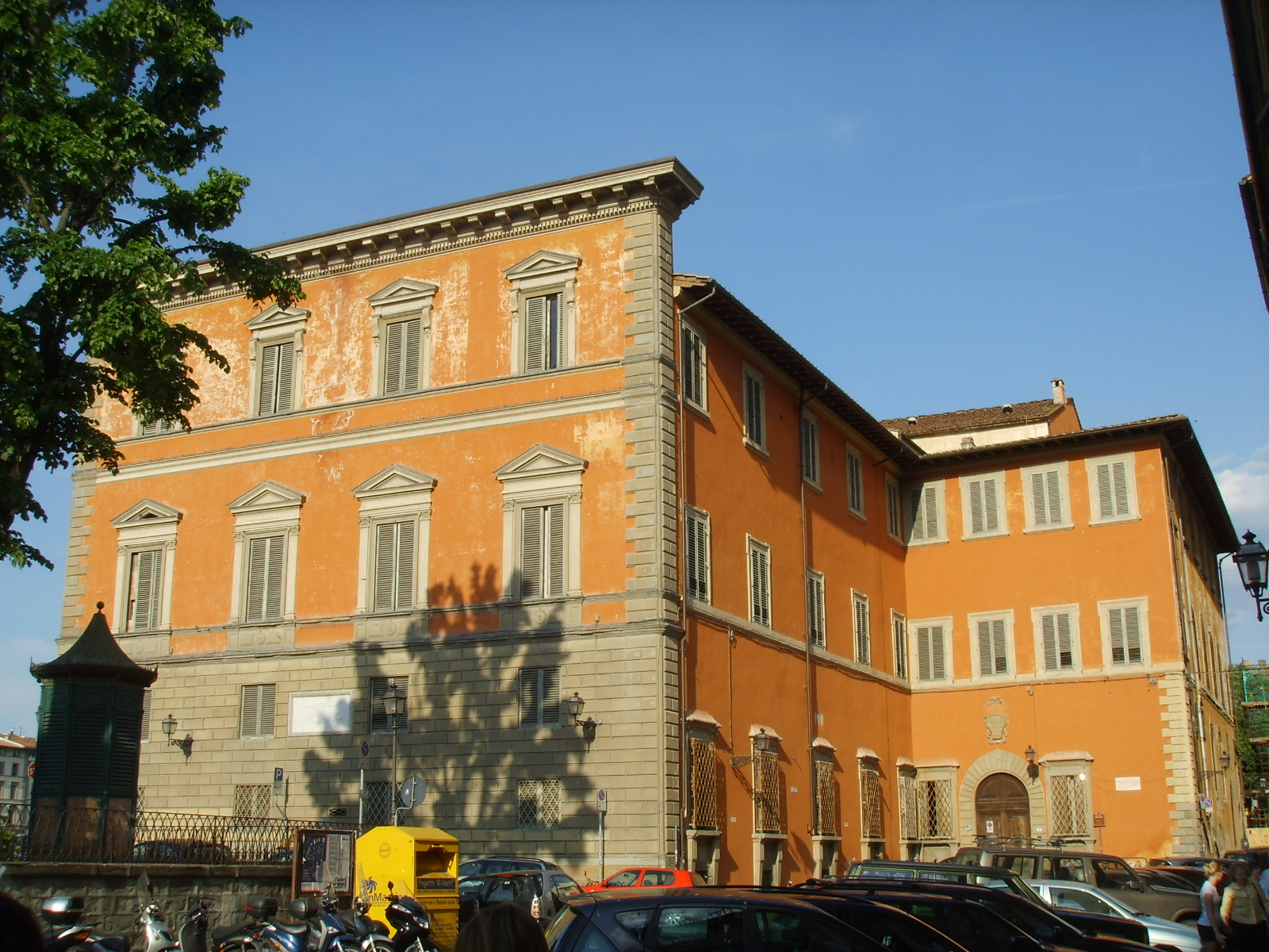 Palazzo serristori, retro